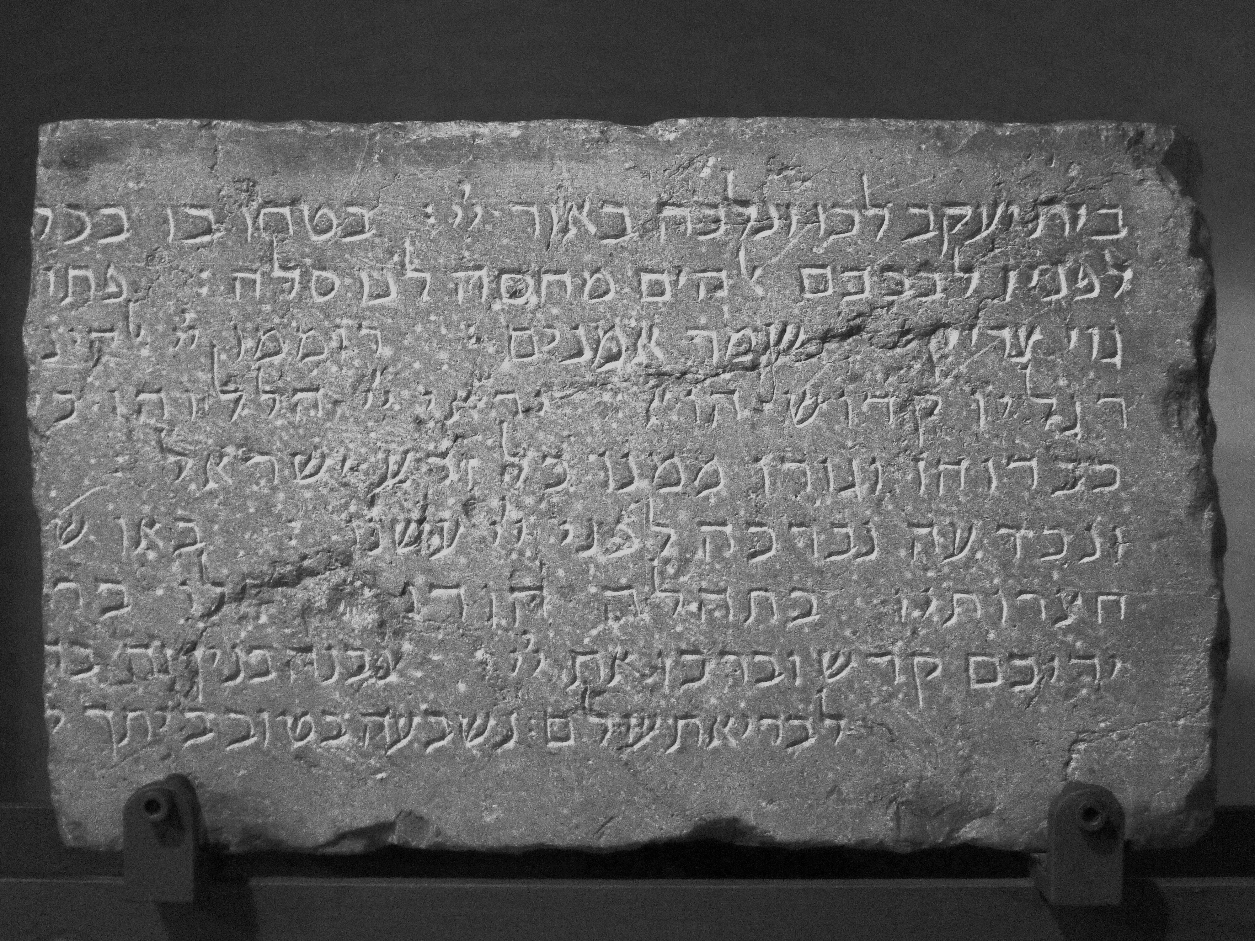 Làpida commemorativa de la sinagoga de Girona, s. XIV, trobada en una casa del carrer de St. Francesc el 1888. (MAC, Girona)